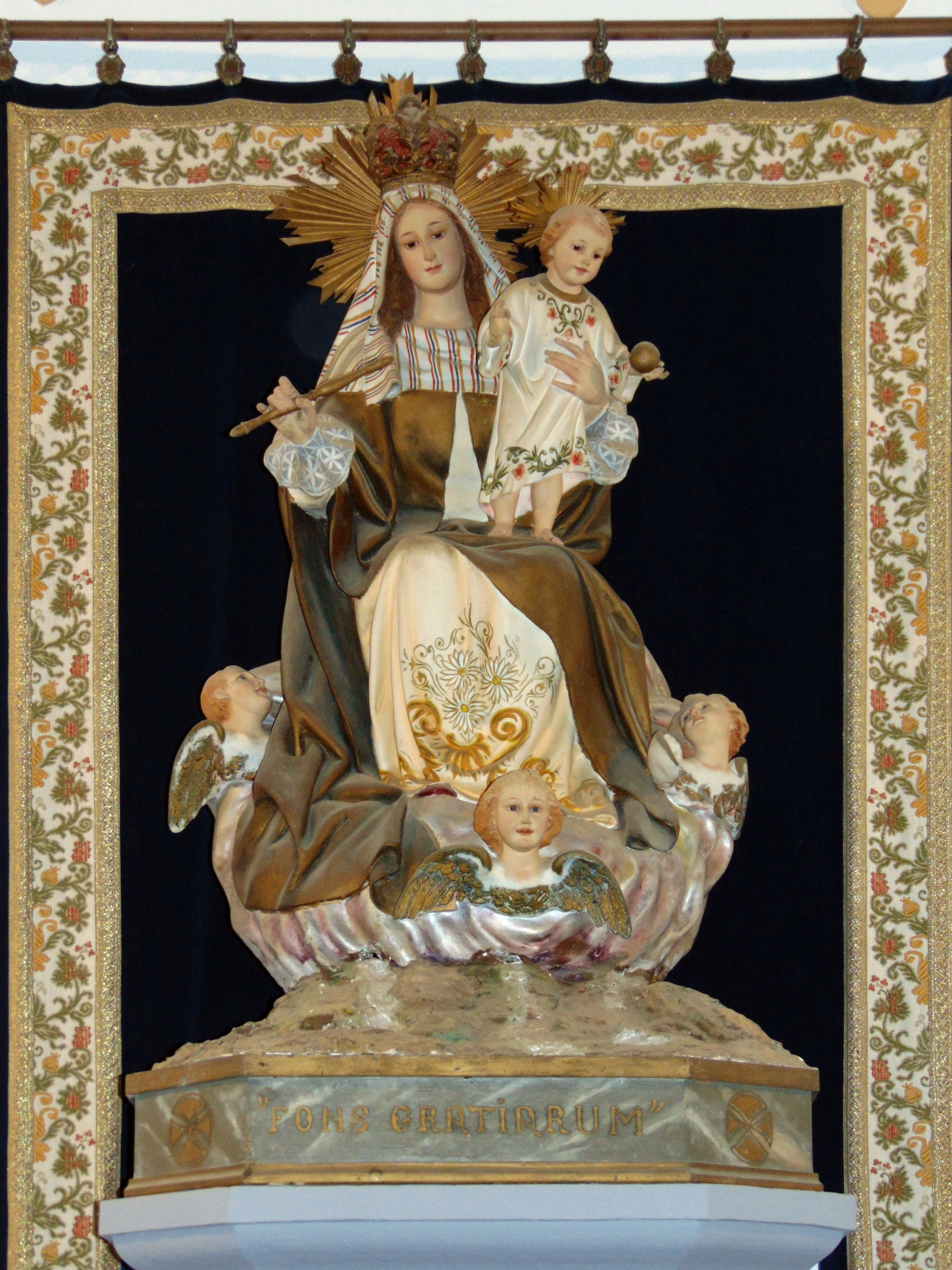 Ermita de la Mare de Déu de les Fonts (Vilobí d'Onyar)